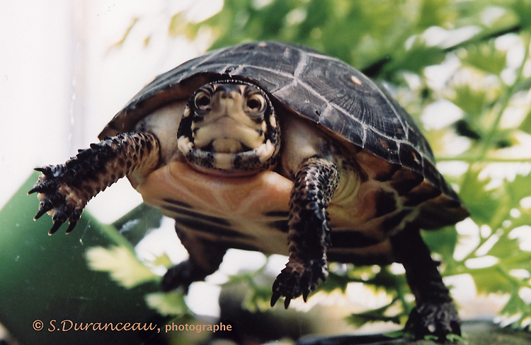 Clemmys guttata Tortue de petite taille, dont la carapace est lisse et noire avec de petits points jaunes clairs. Son plastron est rose saumon avec des motifs noirs, sa tête est lisse et noire avec des points jaunes, son cou est long, ses pattes sont couvertes de petites écailles noires